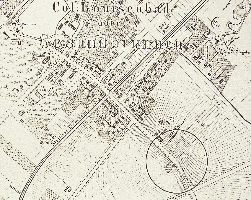 Colonie Louisenbad oder Der Gesundbrunnen um 1863 nach Hobrecht